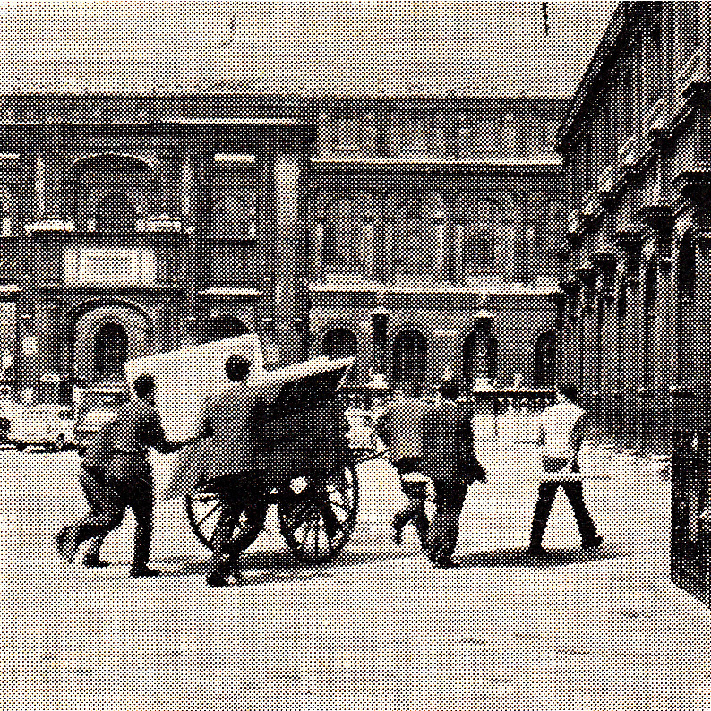 Arrivée d'une charrette dans la cour des Beaux-Arts tirée par des étudiants architectes, Gazette-St-Germain-des-Prés, sept-65